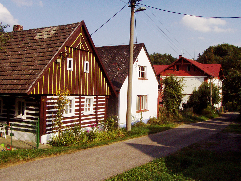 Radostín